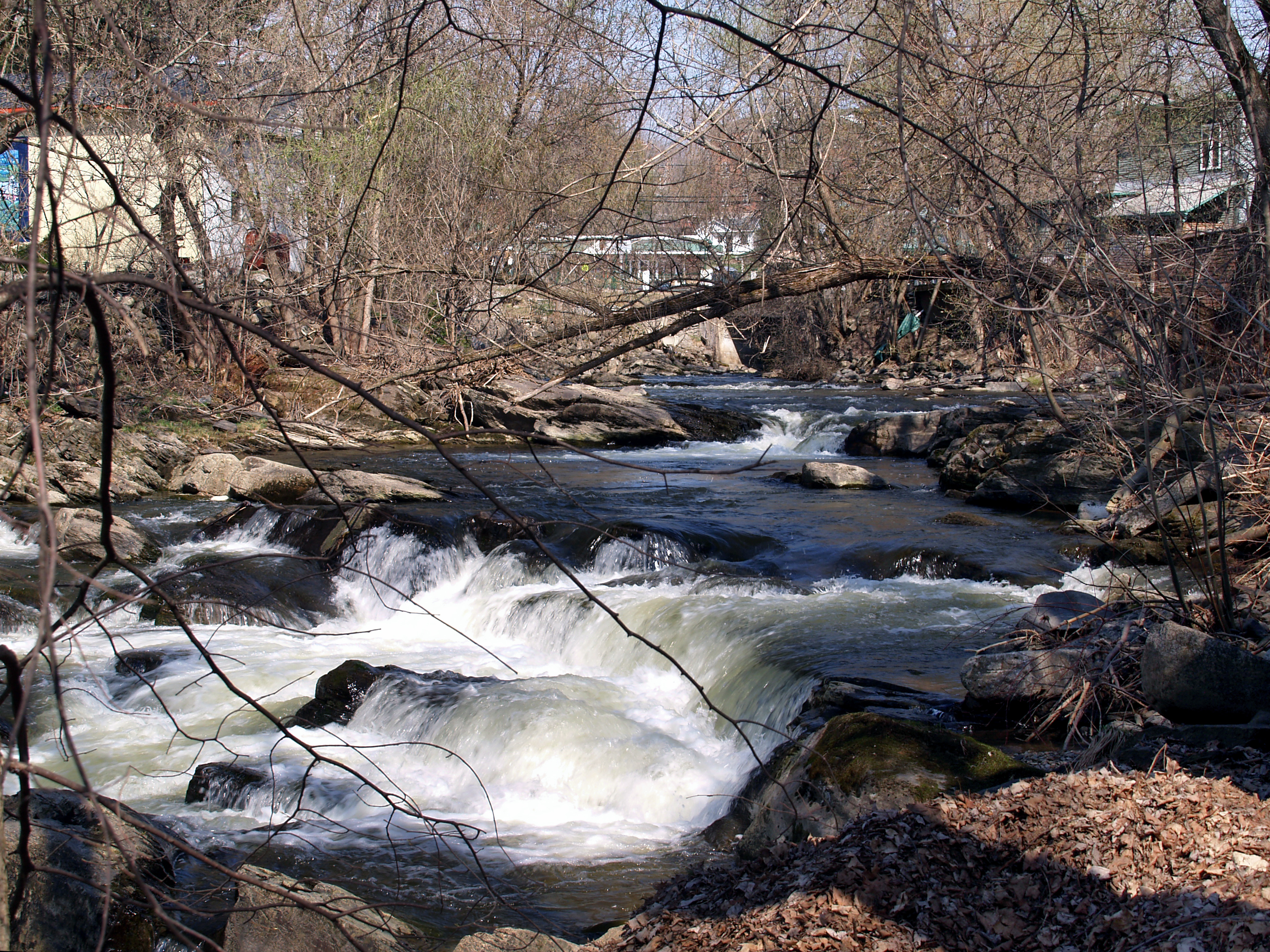 Frelighsburg, Montérégie (Québec) - La rivière aux Brochets en amont du moulin Freligh